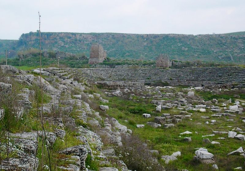 Nordkurve des Stadions in Perge, Kleinasien